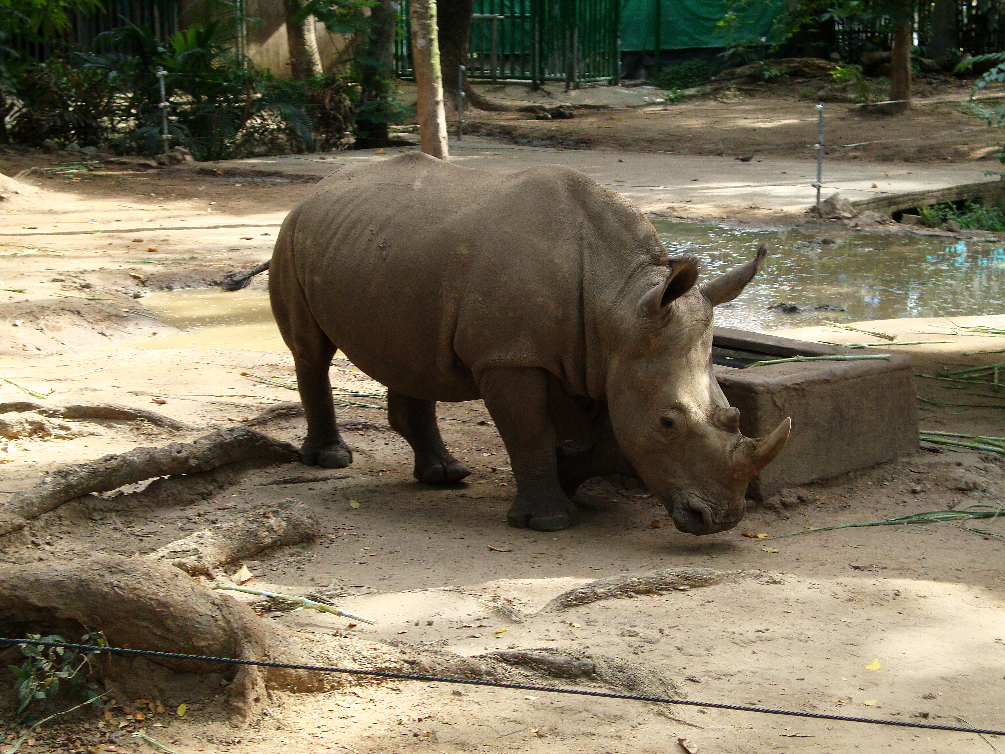 Ceratotherium simum Burchell, 1817Tiếng Việt: Tê giác trắng